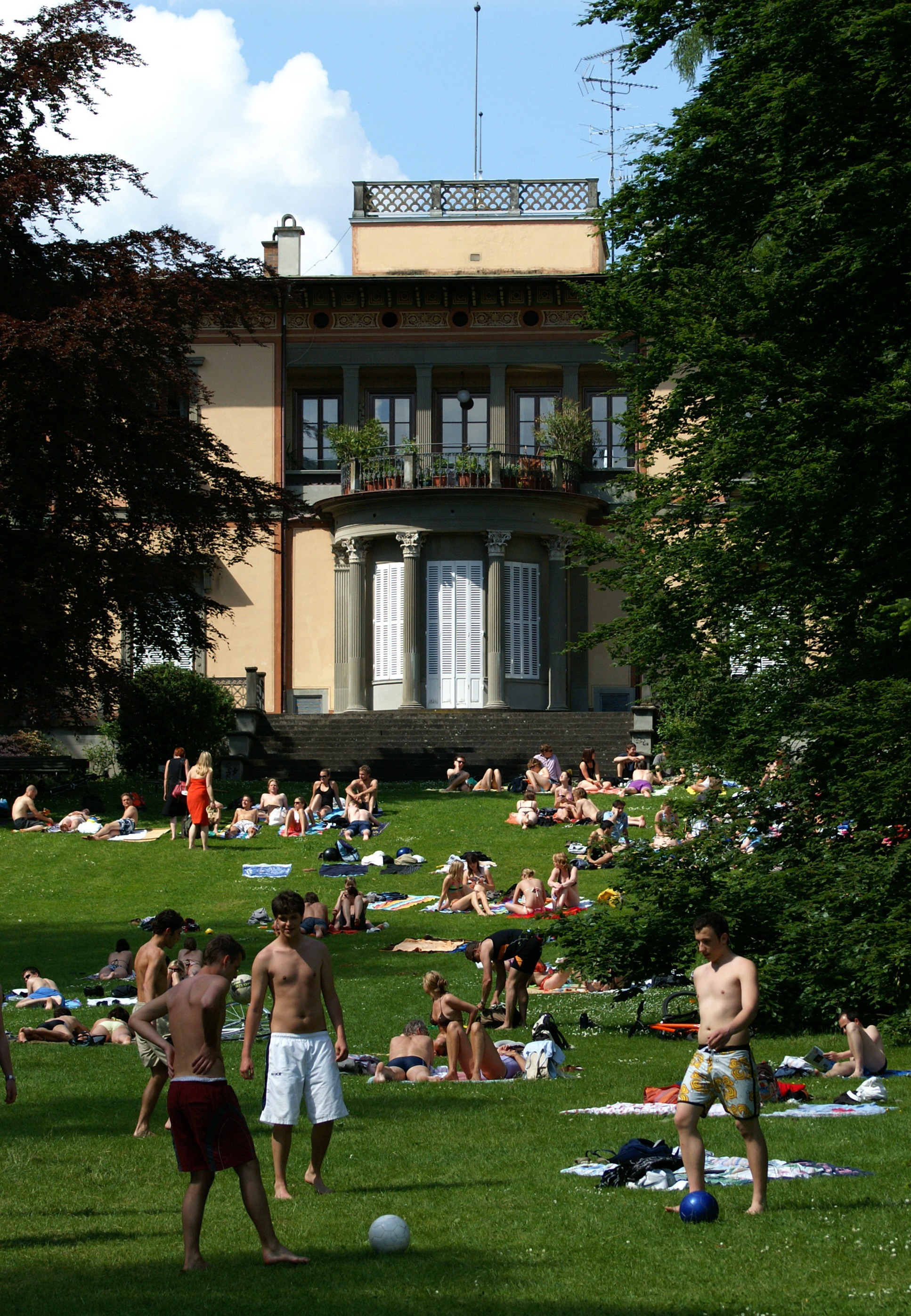 Der Lindenhofpark mit Lindenhof-Villa in Schachen (einem Stadtteil von Lindau, Insel am Bodensee).